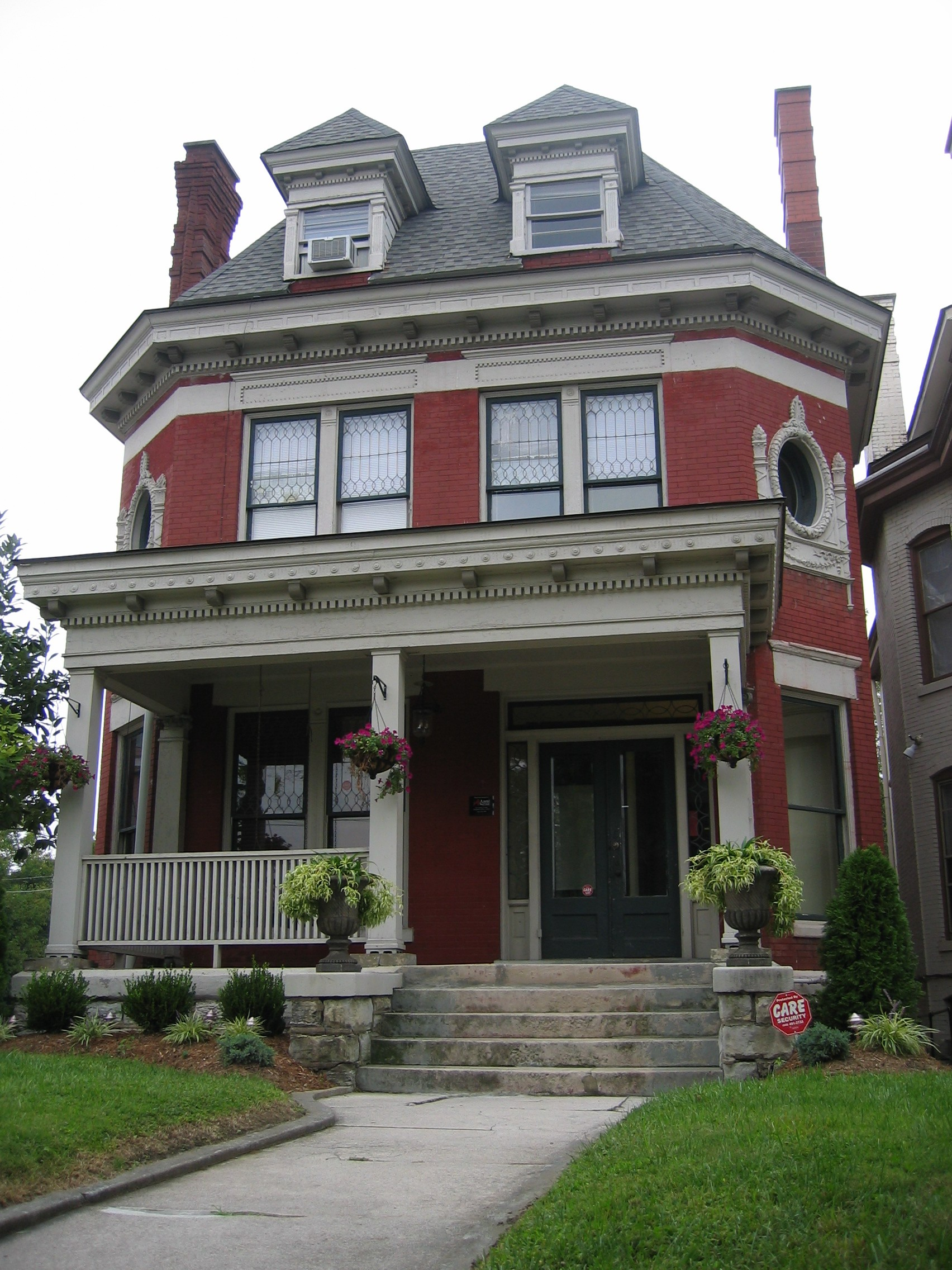 Louisville.Viktorianische Villa in der Altstadt, Kentucky, USA. Louisville verfügt über den größten Bestand an viktorianischen Villen außerhal Englands, ganze Stadtteile sind in diesem Stil gebaut. In einigen dieser Häuser soll es sogar spuken.